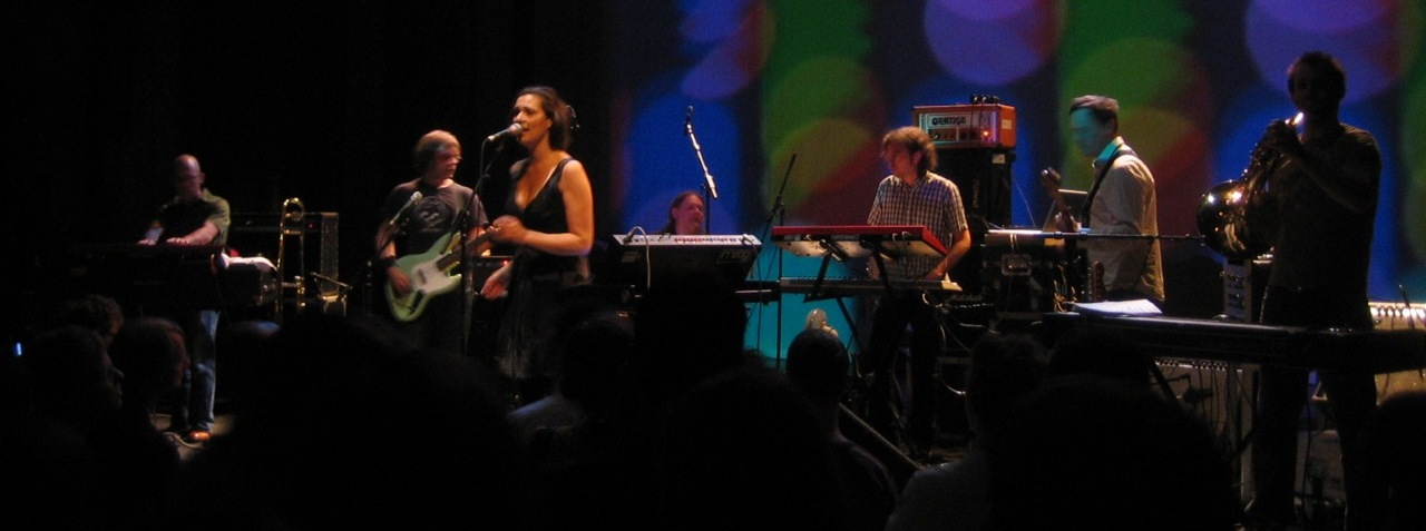 Hebbel am Ufer, 15. Mai 2006